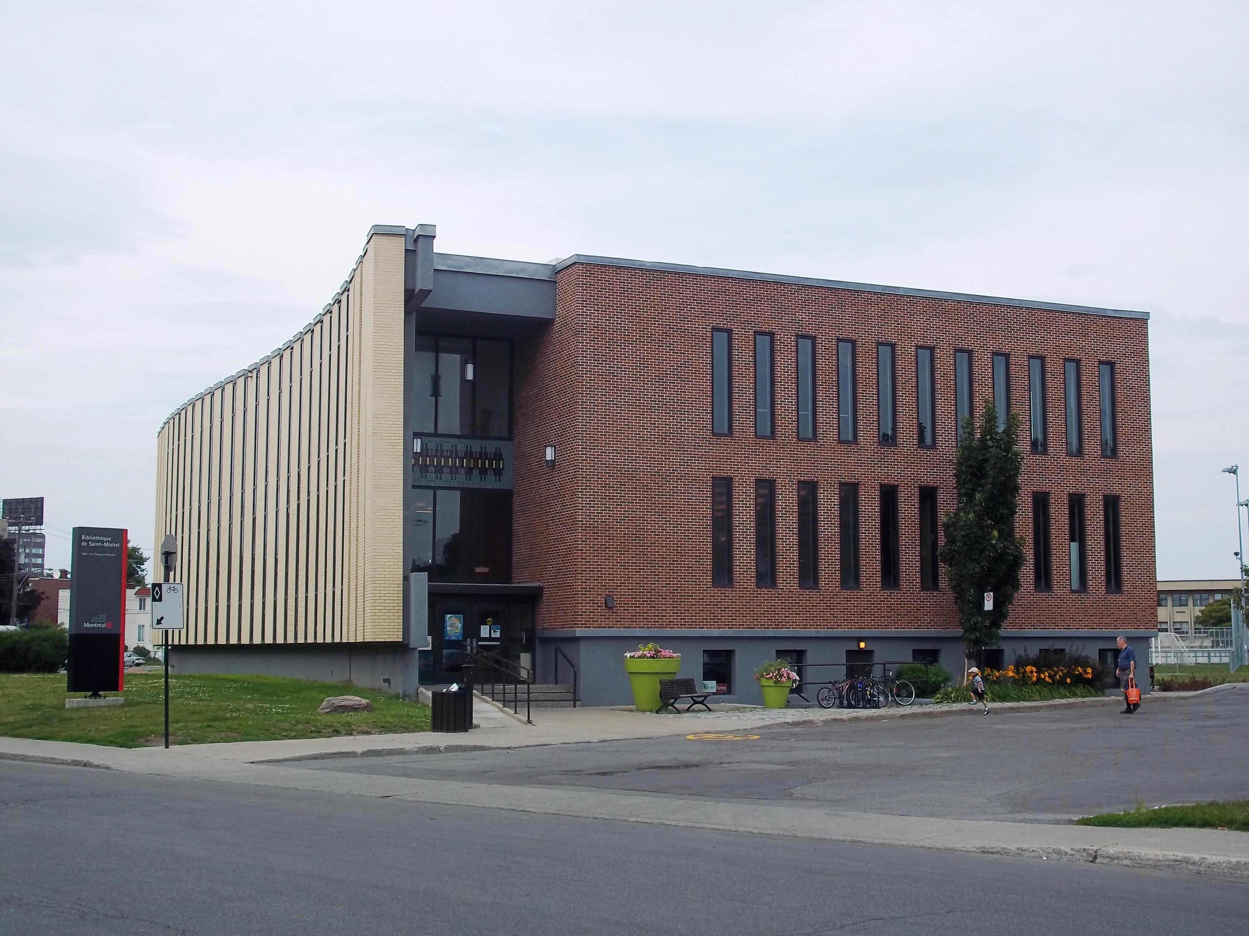 Bibliothèque Saint-Michel, 7 601, rue François-Perrault, Montréal